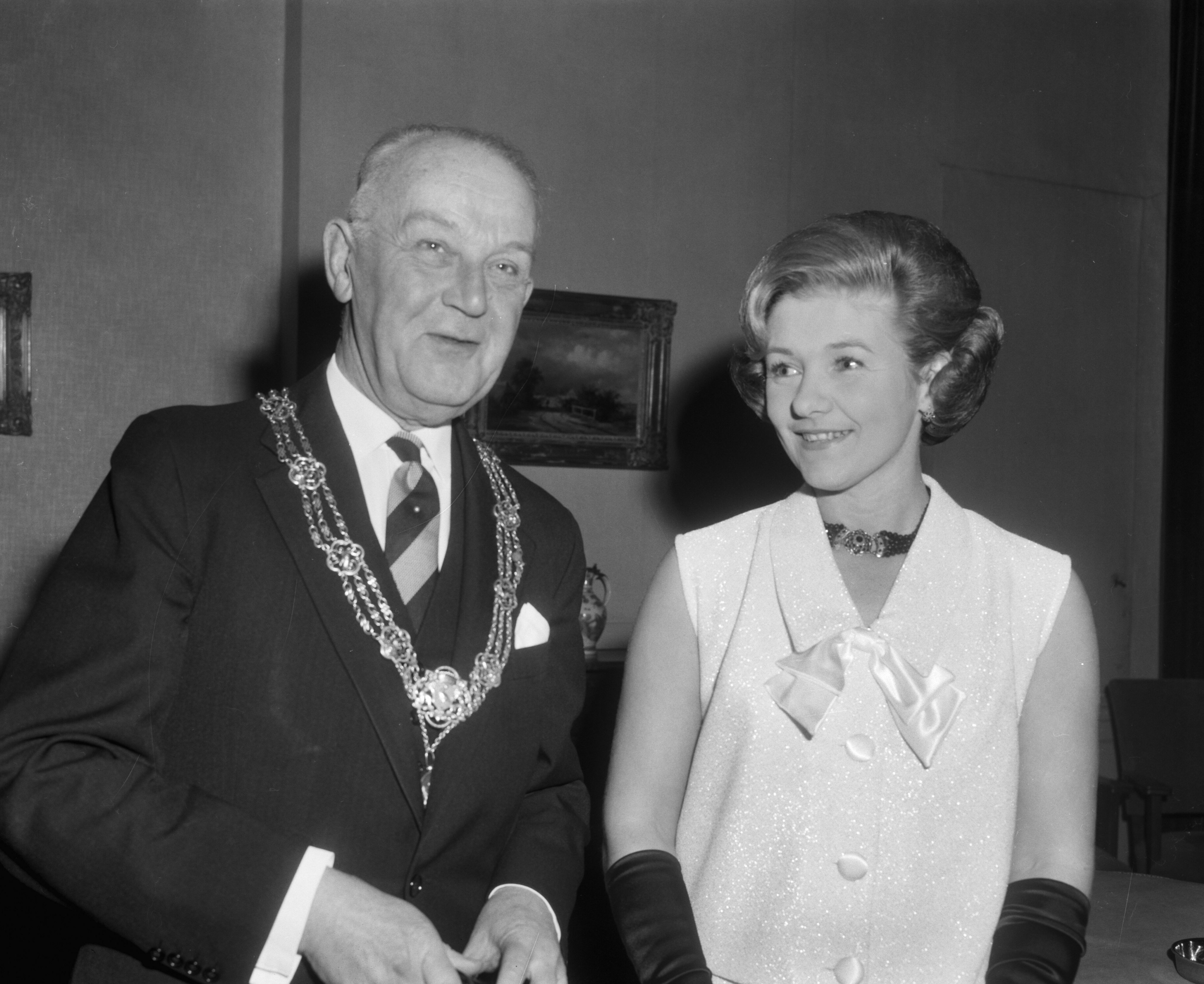 Prijzen Jan Campert Stichting uitgereikt te Den Haag, burgemeester Kolfschoten en Gertie Evenhuis, 21 december 1964